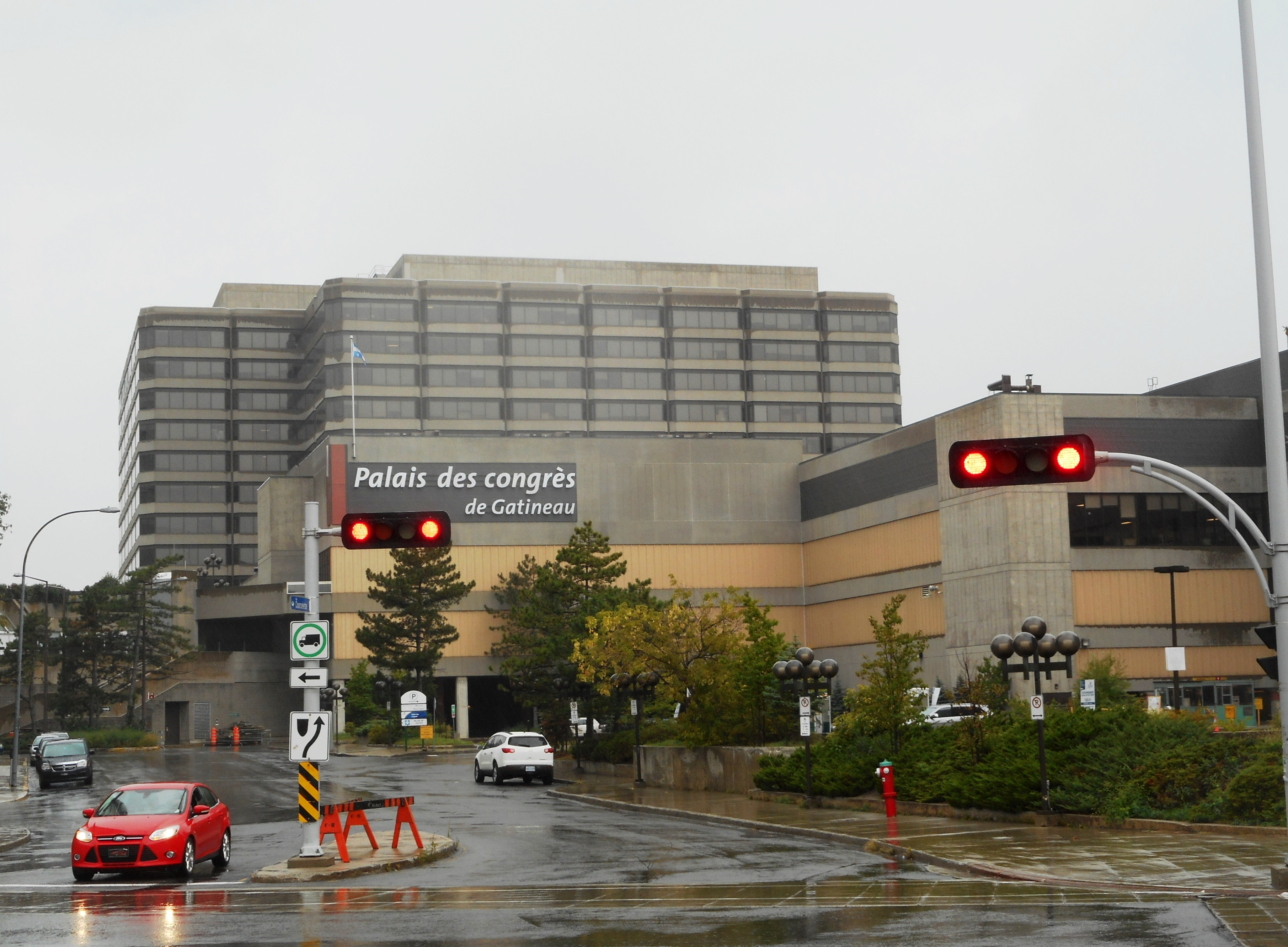 Palais des congrès de Gatineau, 50, boulevard Maisonneuve, Gatineau Vue de la rue Courcelette